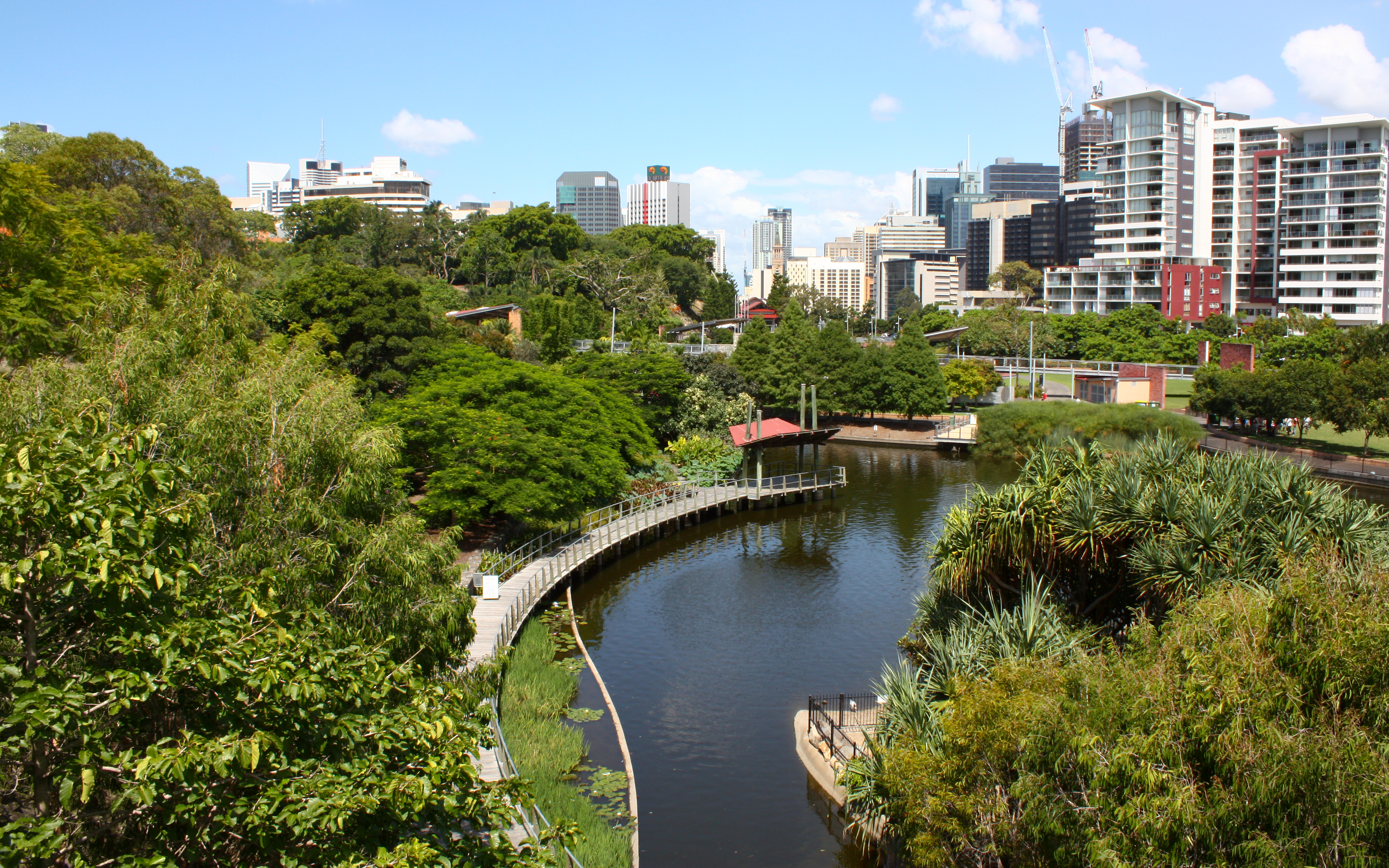 Roma Street Parklands, Brisbane